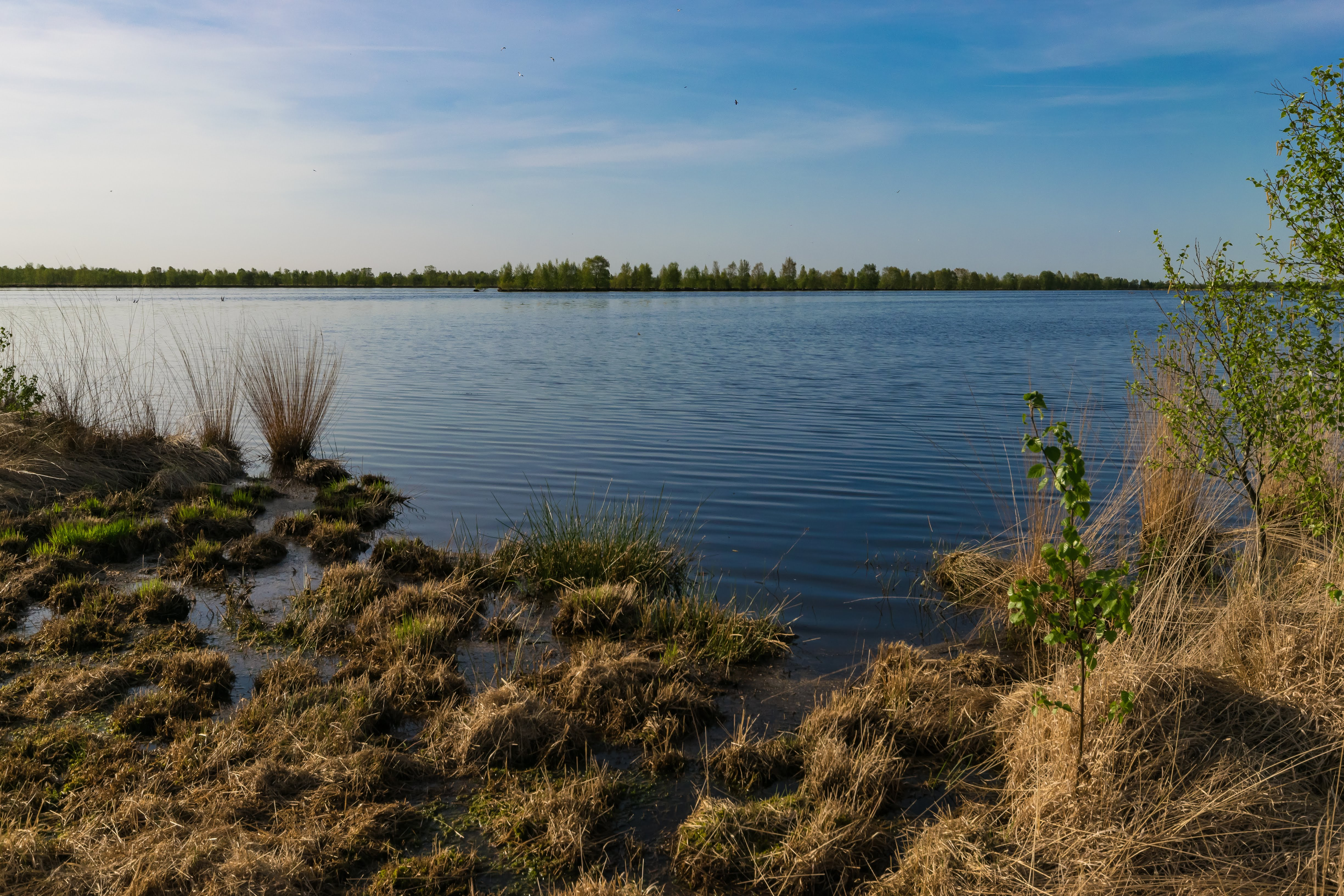 Blick auf das Dalum-Wietmarscher Moor bei Twist